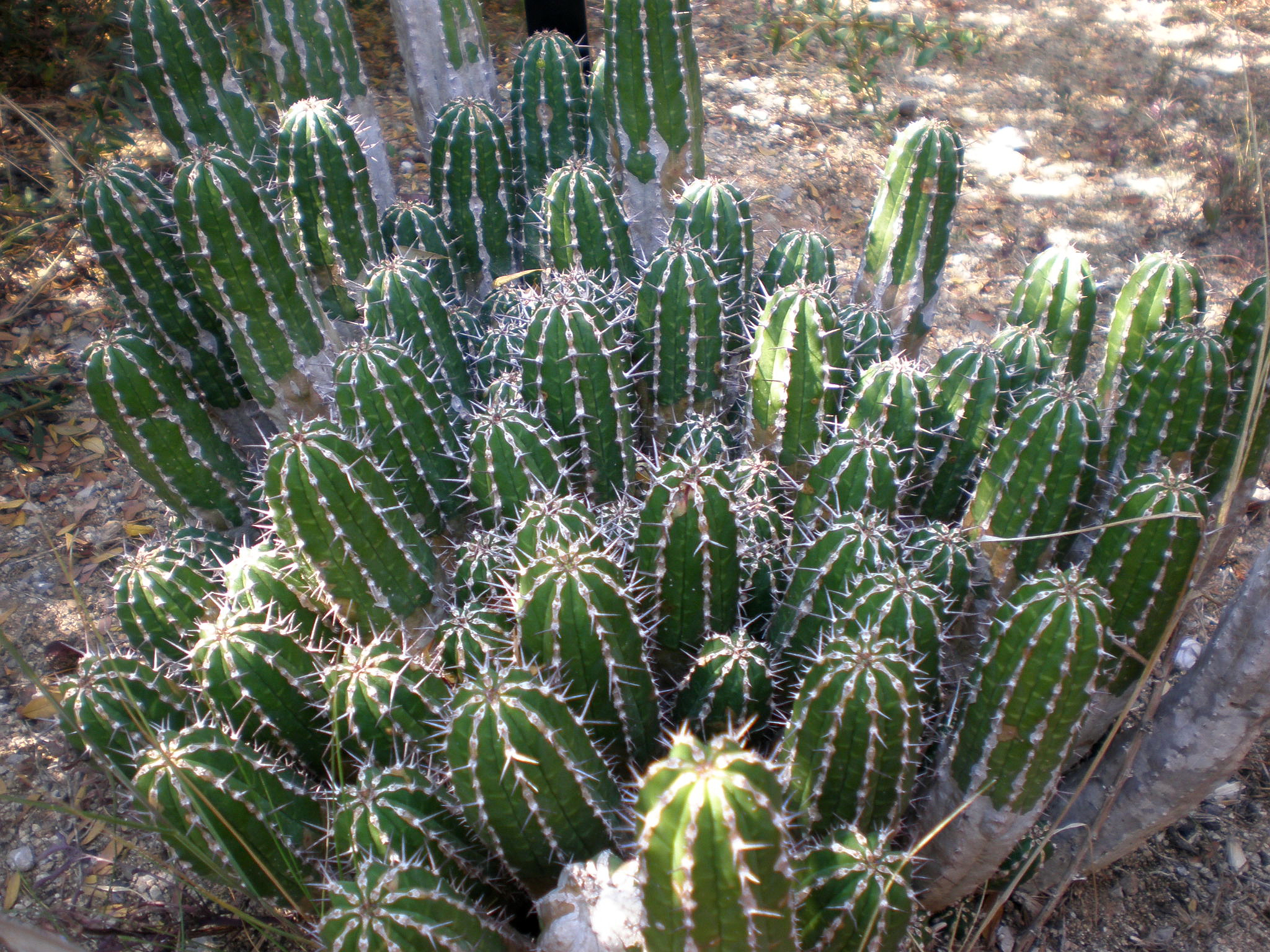 Jardín Botánico de Barcelona.